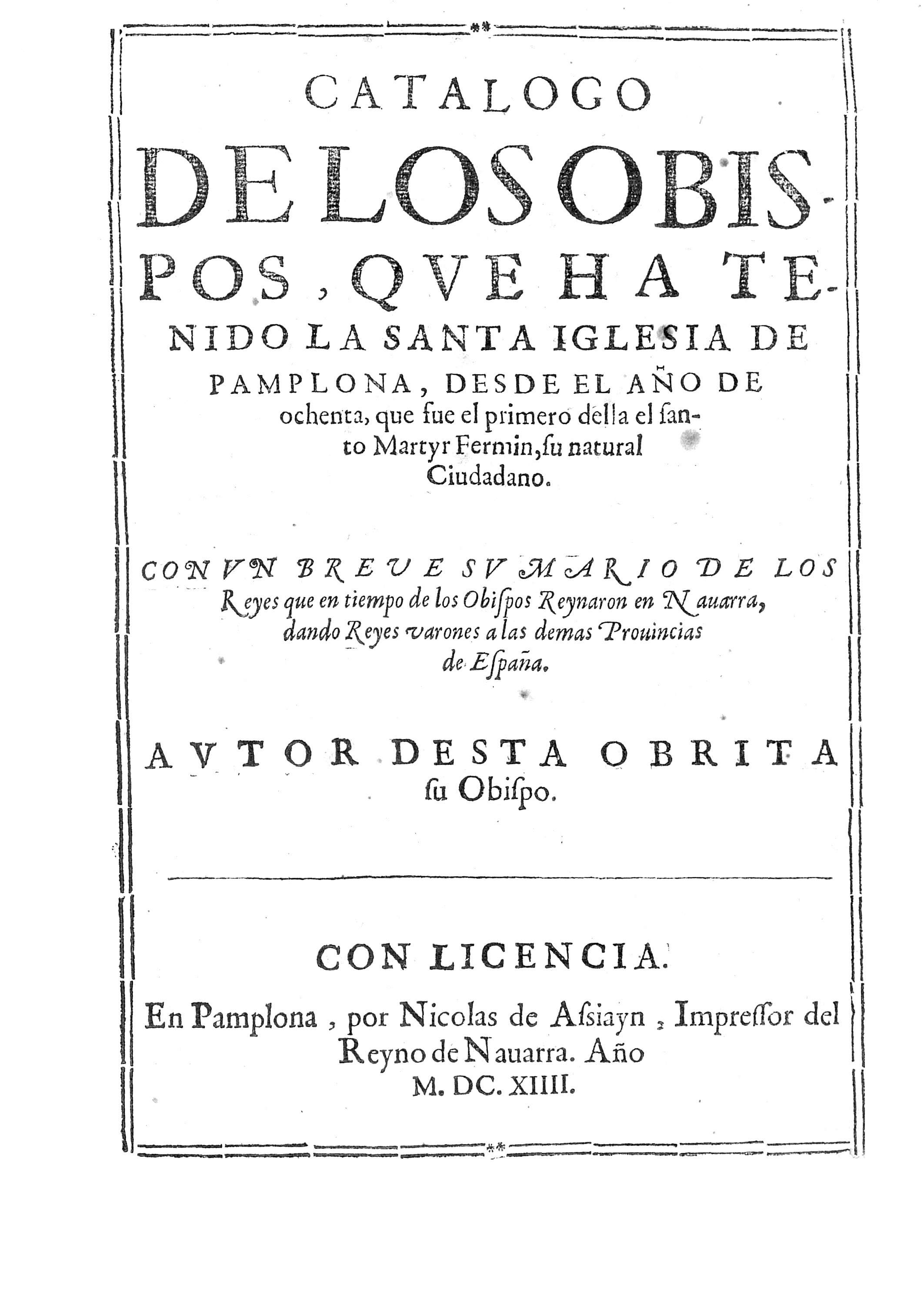 Nicolas Asiain, Catálogo de los obispos ... Pamplona, Rojas y Sandoval, 1614, Pamplona